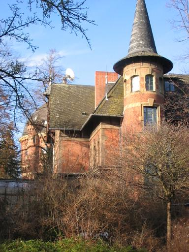 Villa Anna und Wasserturm von Otto Techow auf dem Fichtenberg in Berlin-Steglitz, Schmidt-Ott-Str. 14